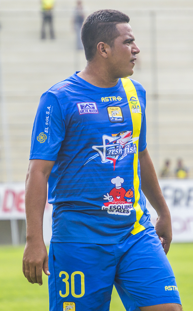 César Barre con la camiseta de Delfín en 2015